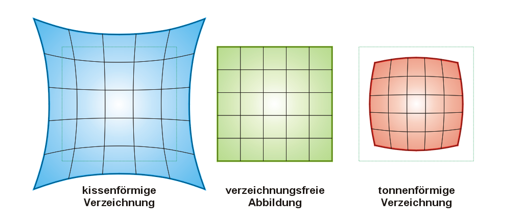 Korrektur einer bereits kursierenden früheren Grafik für die geometrische Verzeichnungmit hier korrigierten Größenrelationen der verzeichneten Abbildungen relativ der ungestörten Abbildung.